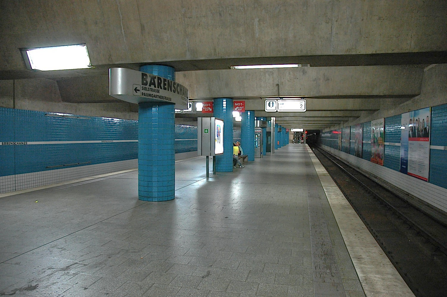 Der U-Bahnhof 'Bärenschanze' in Nürnberg